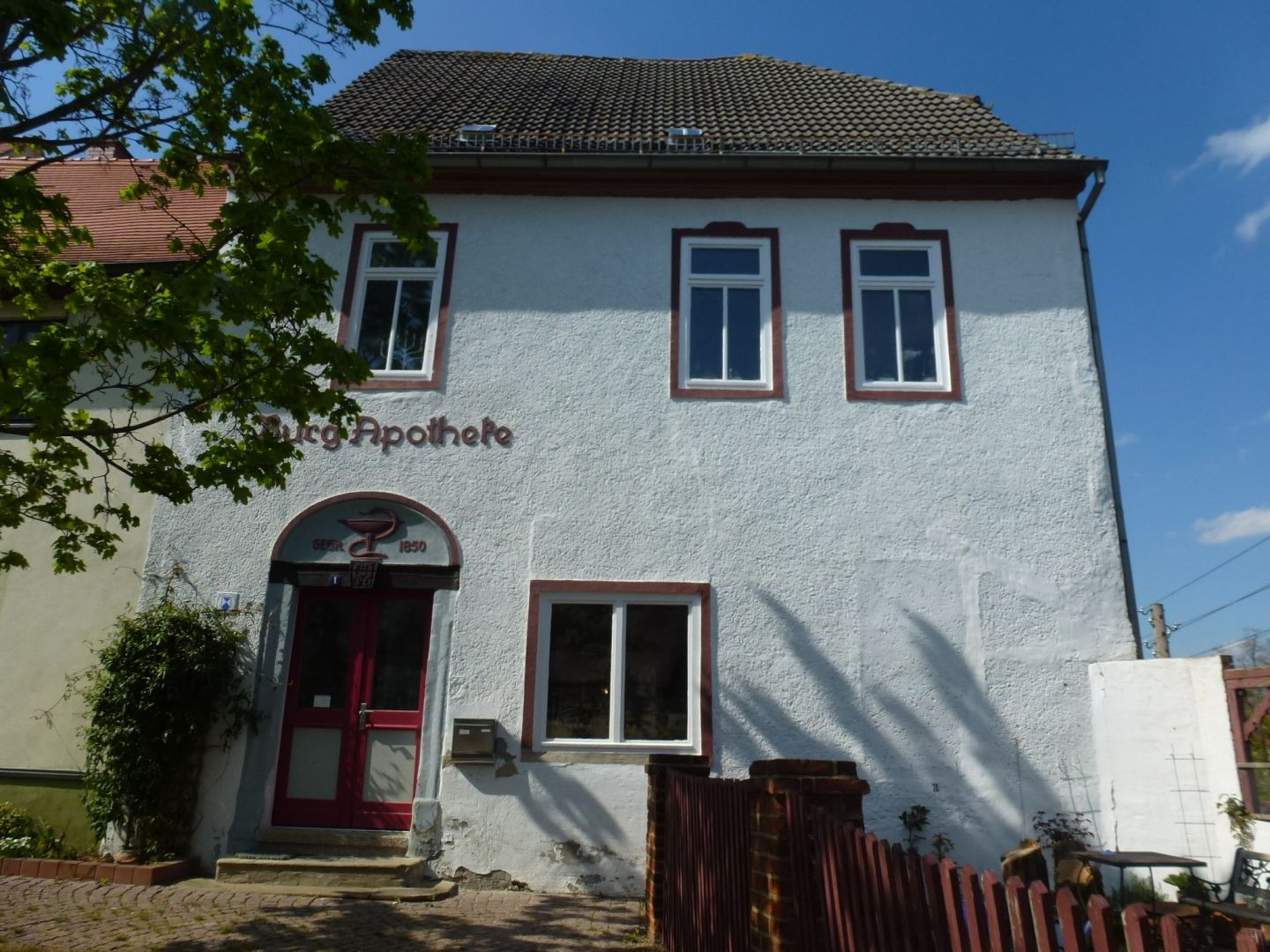 Burgapotheke in Schkölen, 1850 gegründet